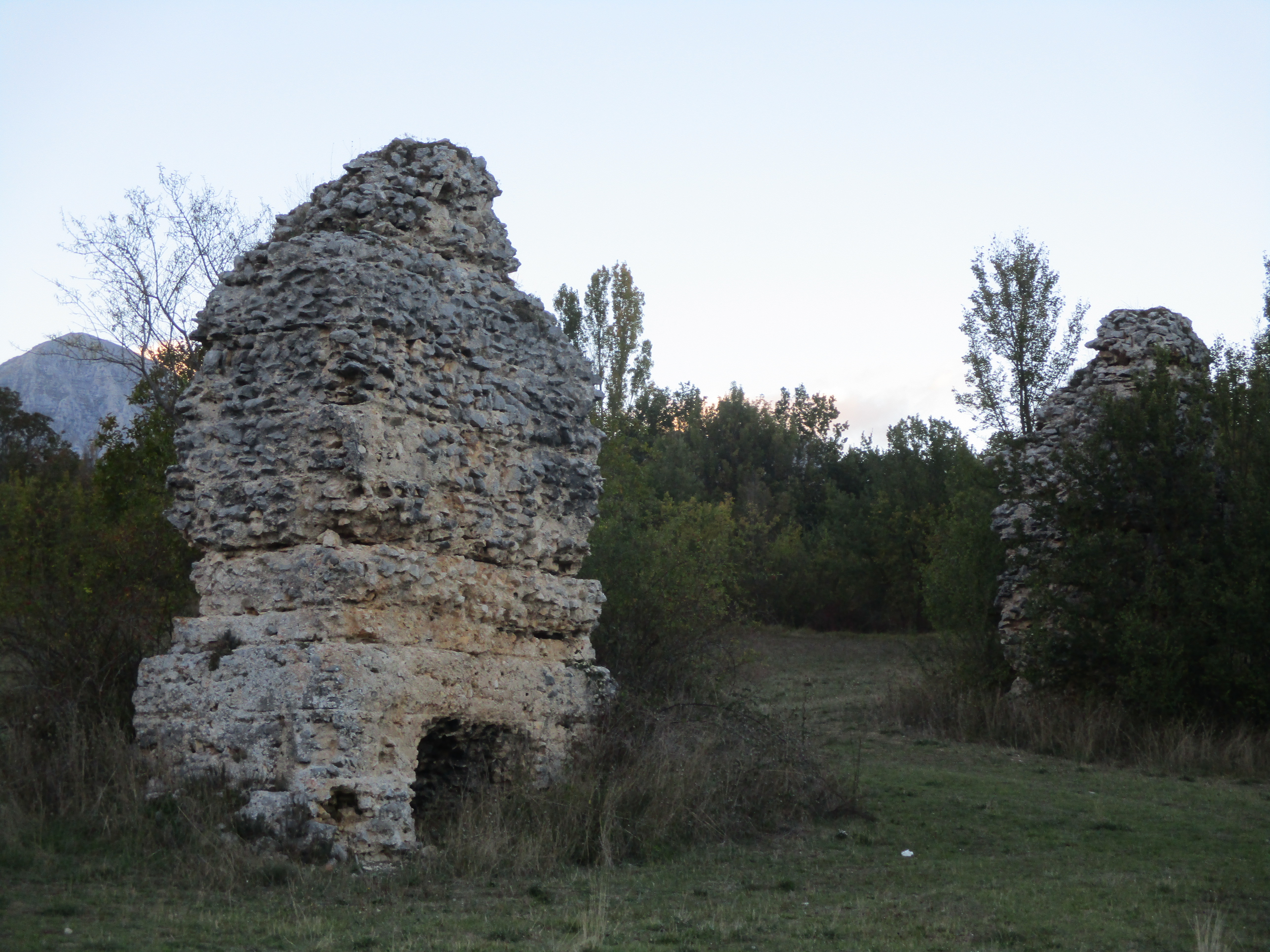 Mausolei di valle Solegara